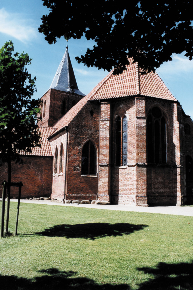 Dorfkirche in Kalkhorst, Blick auf den Chor (Mecklenburg-Vorpommern)